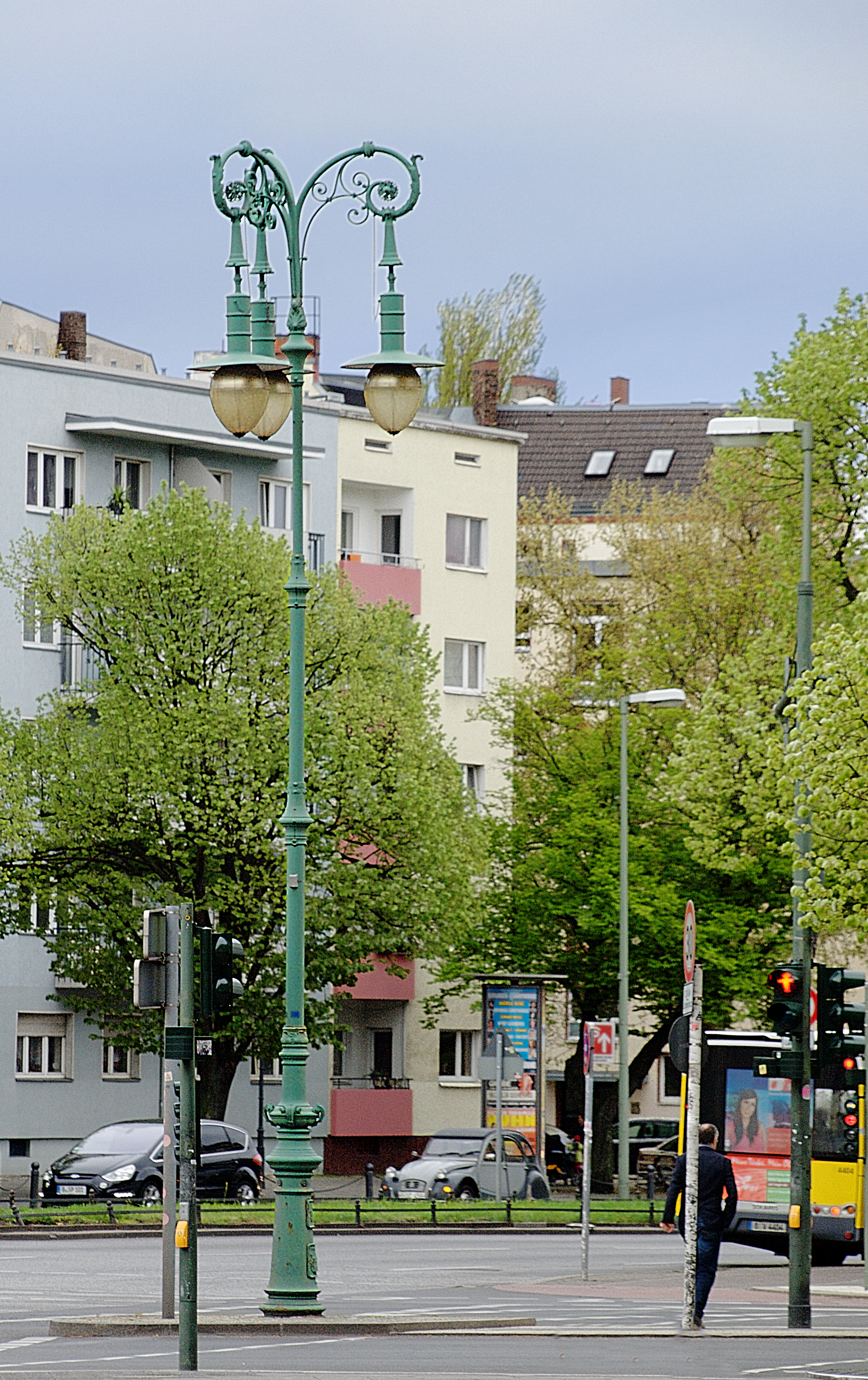 Nachbau des dreiarmigen Witzleben-Kandelabers in der Kreuzung Spandauer Damm, Otto-Suhr-Allee, und Kaiser-Friedrich-Straße, Nähe Luisenplatz in Berlin-Charlottenburg.